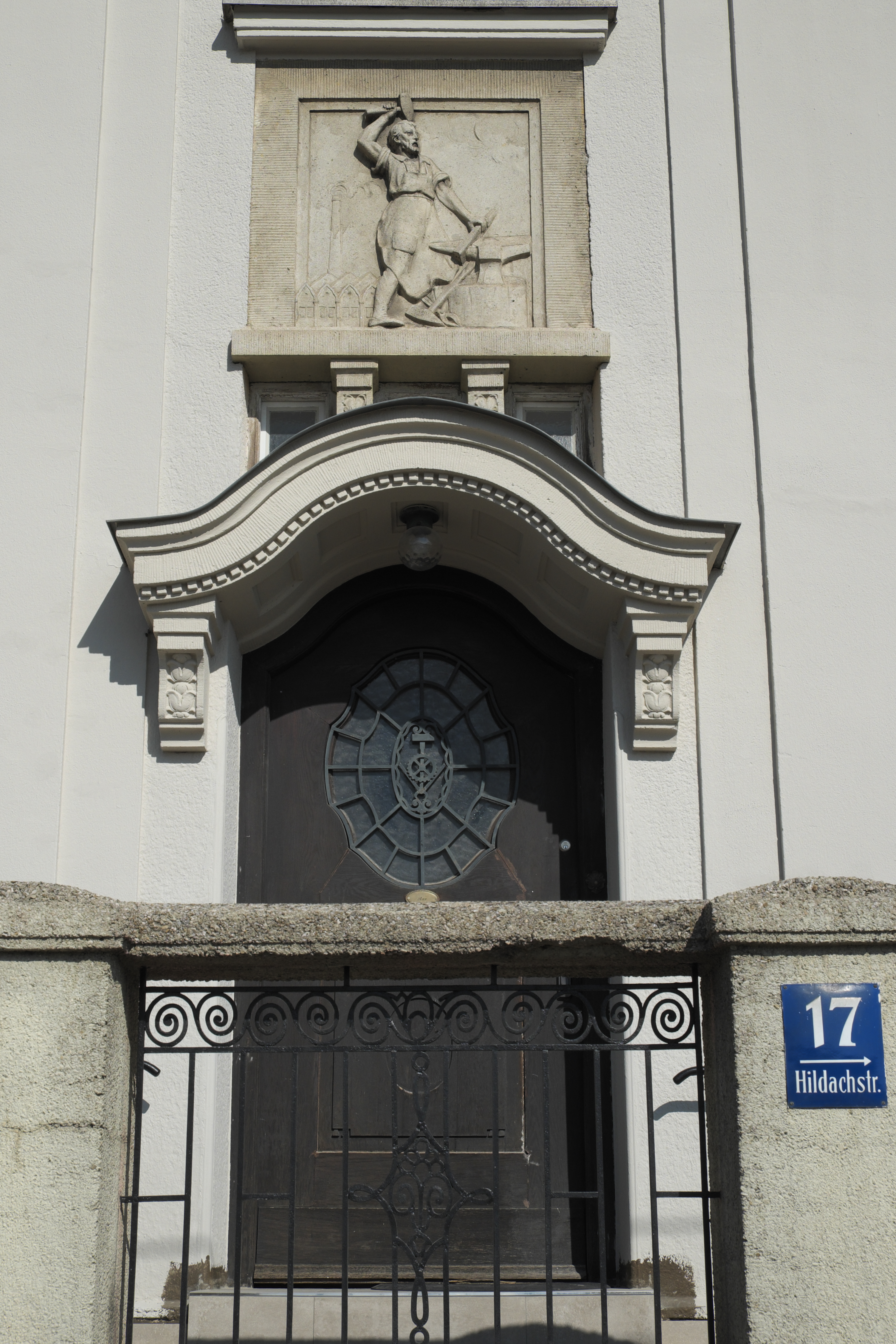 Villa in der Hildachstraße 17 in Pasing im Stadtbezirk Pasing-Obermenzing in München (Bayern/Deutschland), 1913/14 von den Gebrüdern Ott errichtet, Eingang